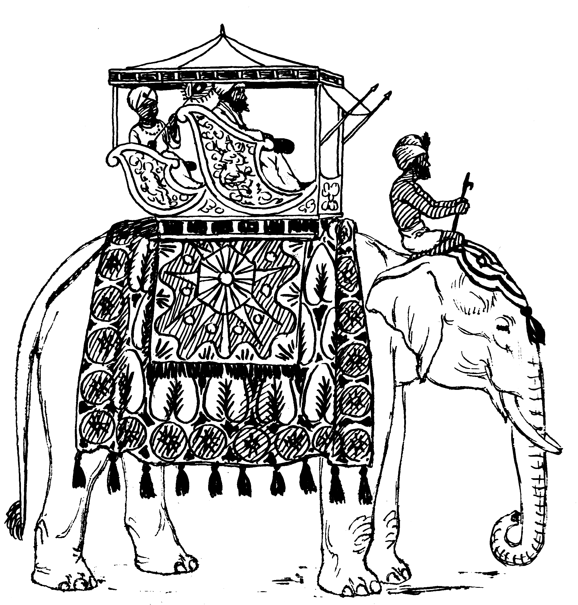 Howdah. Elephant